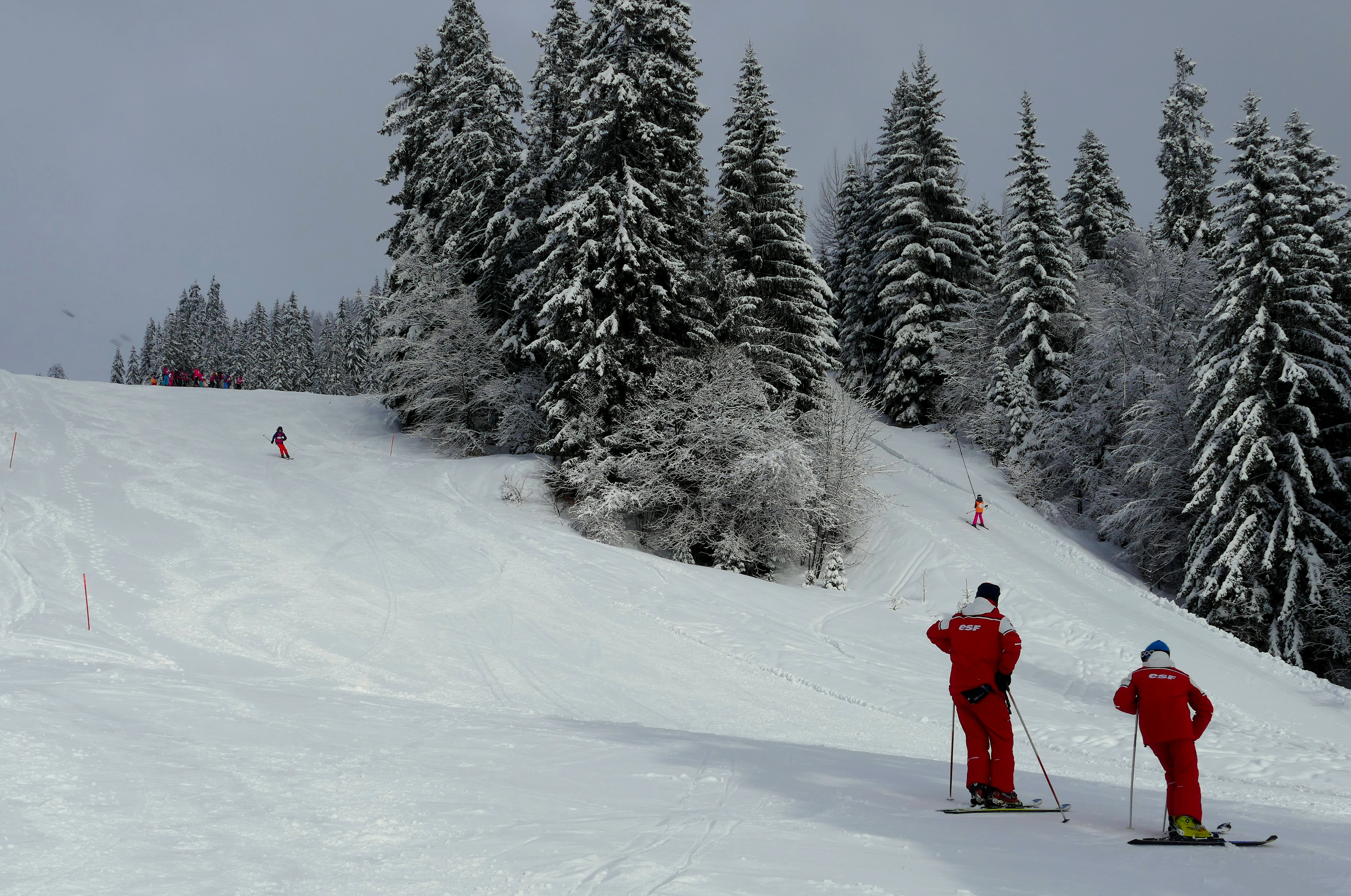 Station de Passy Plaine-Joux (Haute-Savoie), moniteurs ESF surveillant un cours de ski d'une classe de neige.